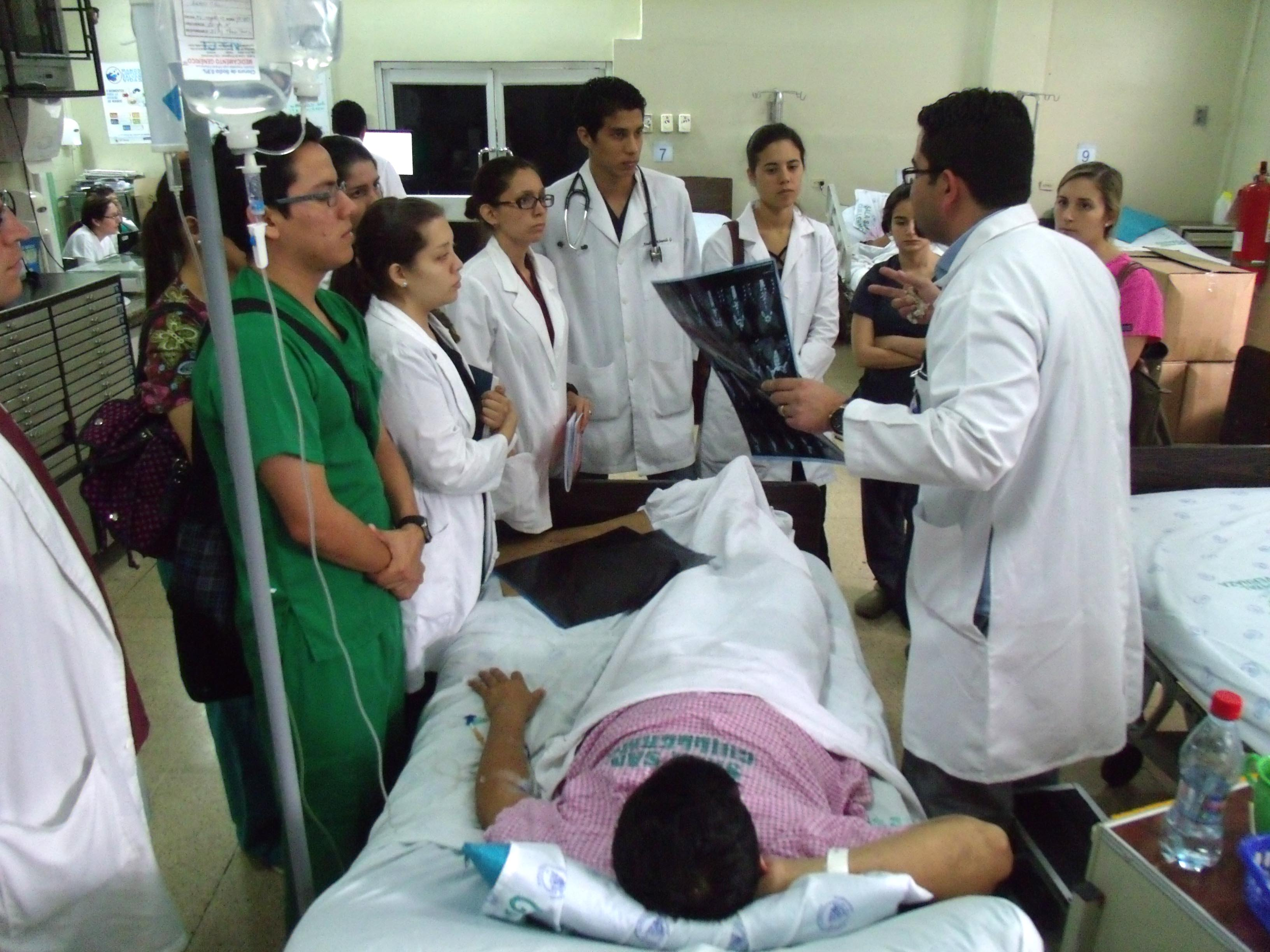 Guayaquil, 12 ags 2014 (Andes) El Hospital Vernaza (Guayaquil), inicia campaña de prevención de cáncer prostático con chequeos gratuitos, esto va dirigido a personas de escaso recursos que no cuentan con ningún tipo de seguro. Foto: Víctor H. Asencio/Andes